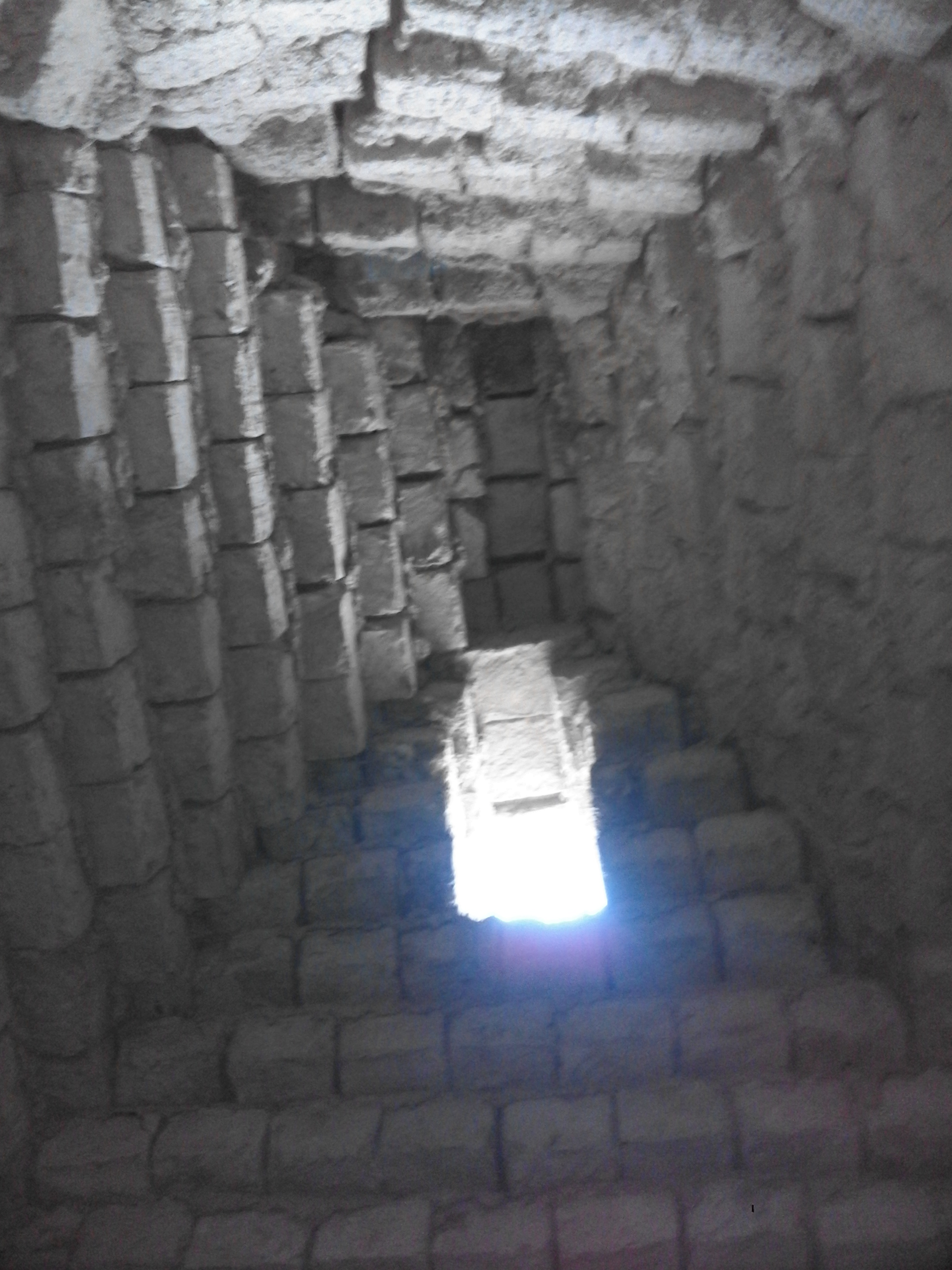 Мавзолей волостного управителя Нурлана Байсеитова. купол